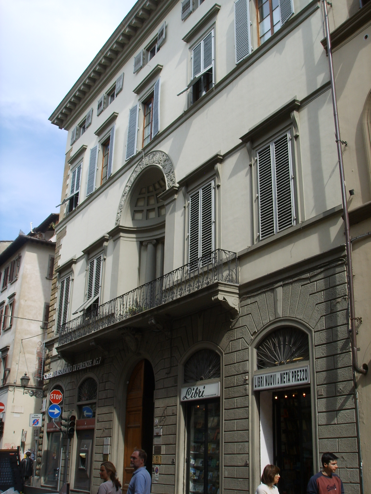 Palazzo_Durazzo in Florence